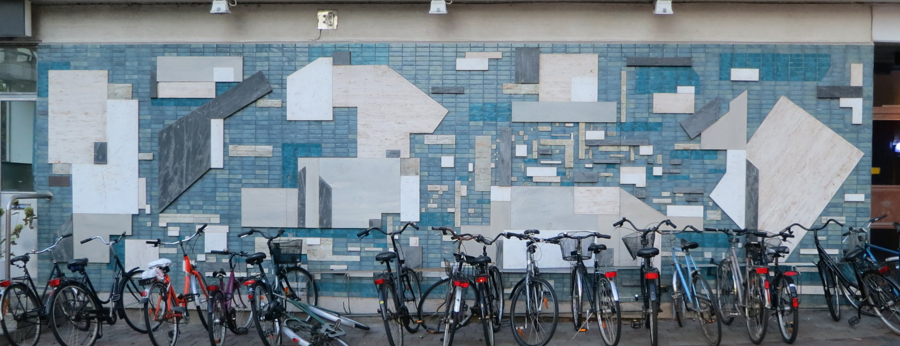 Utomhussymfoni, fasadkonst i området Kronborg i Malmö